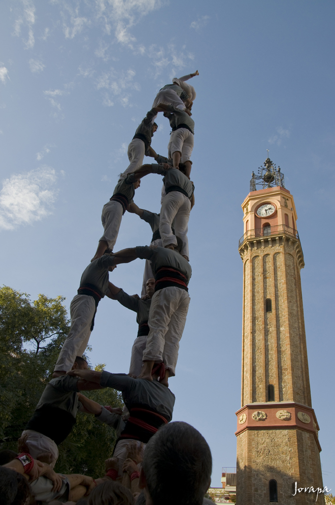 Torre del Rellotge (Barcelona)